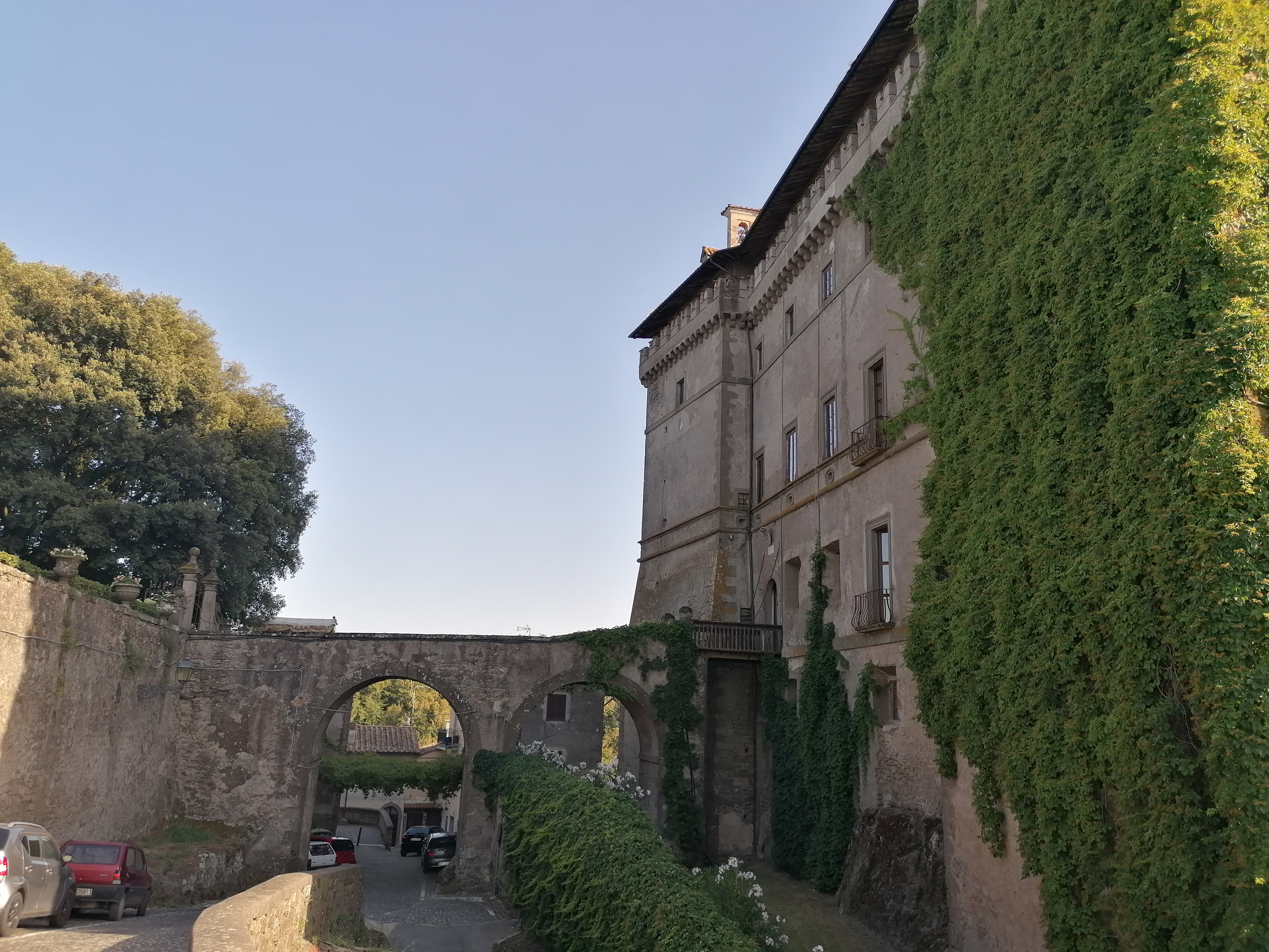 Ponte del castello Ruspoli, costruito tra il castello e il suo giardino.